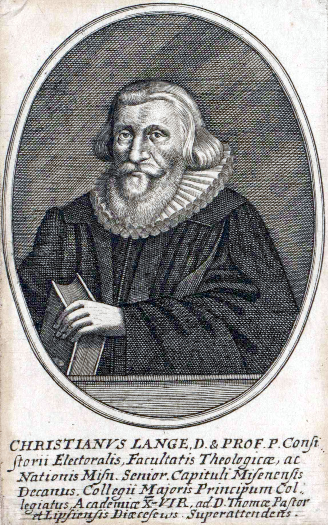 Christian Lange (1585-1657) deutscher lutherischer Theologe